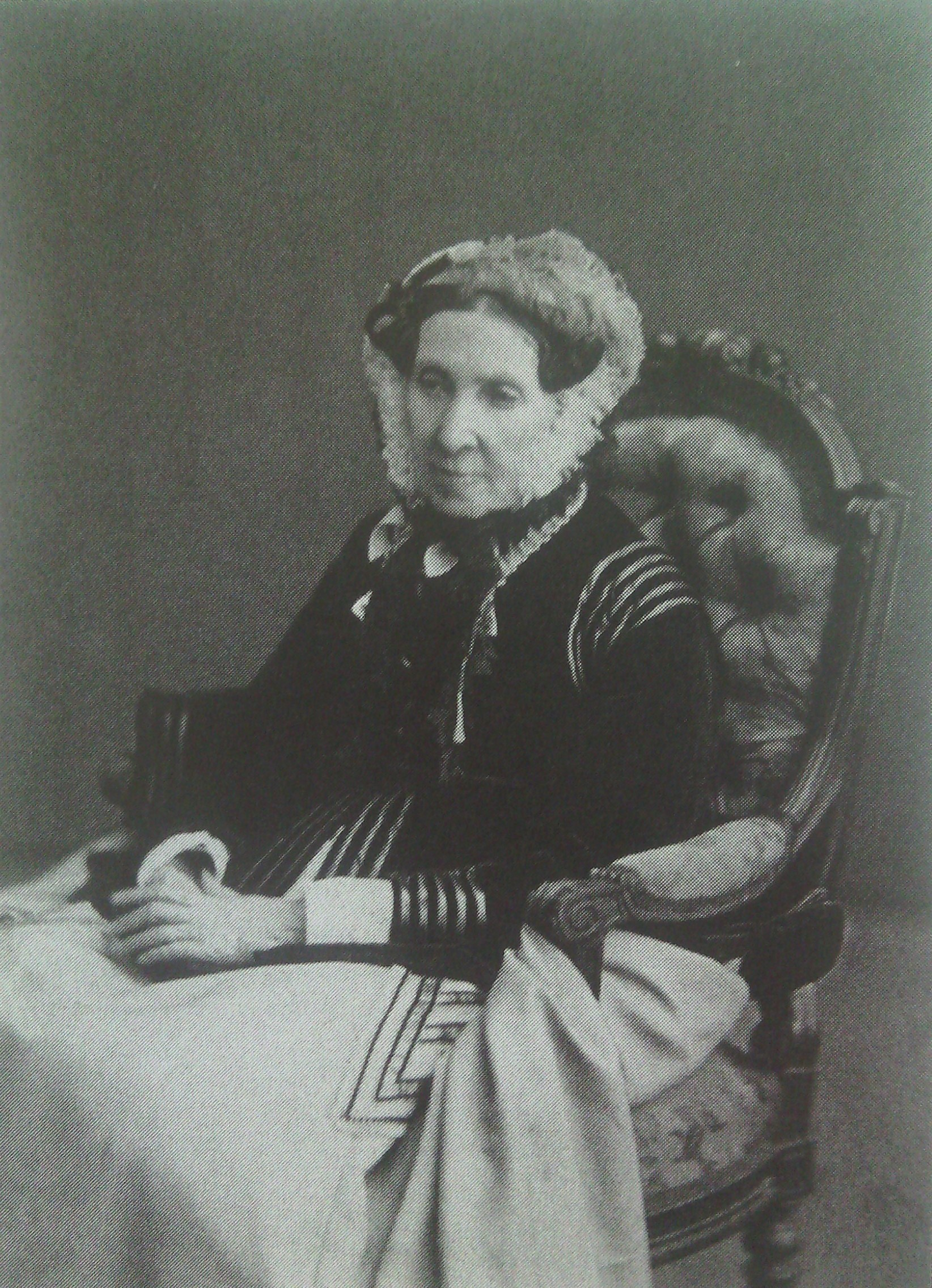 Татьяна Борисовна Потемкина (1797-1869), ур. Голицына